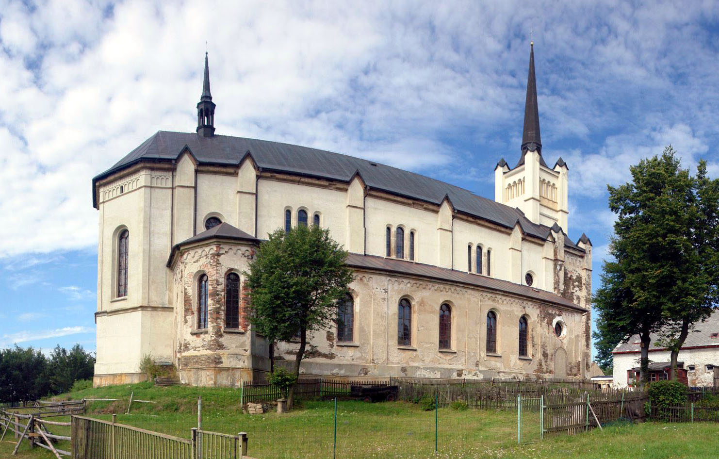 Kostel sv. Václava (Výsluní), okraj obce, Výsluní